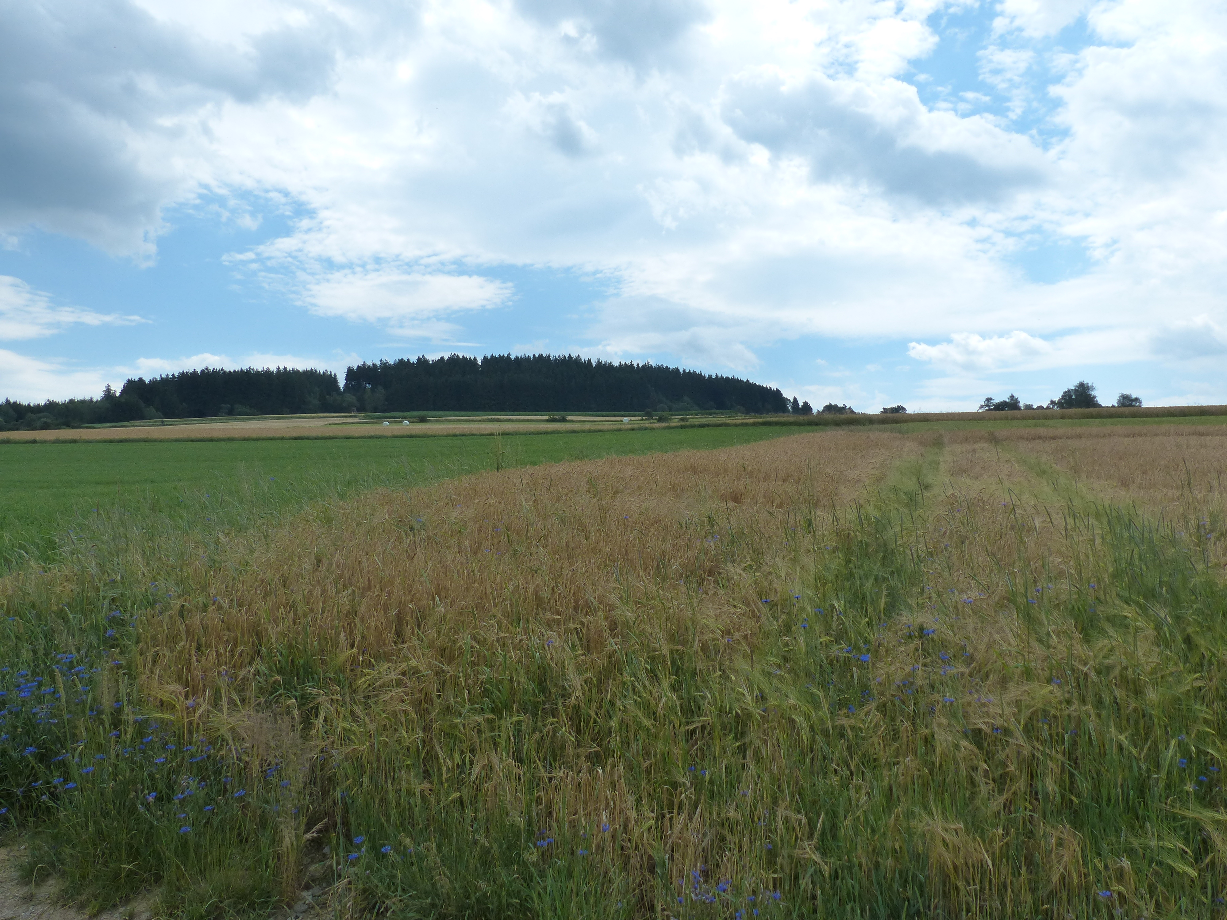 Areal der Wüstung Wüstengrün bei Uschertsgrün, nördlich von Schauenstein